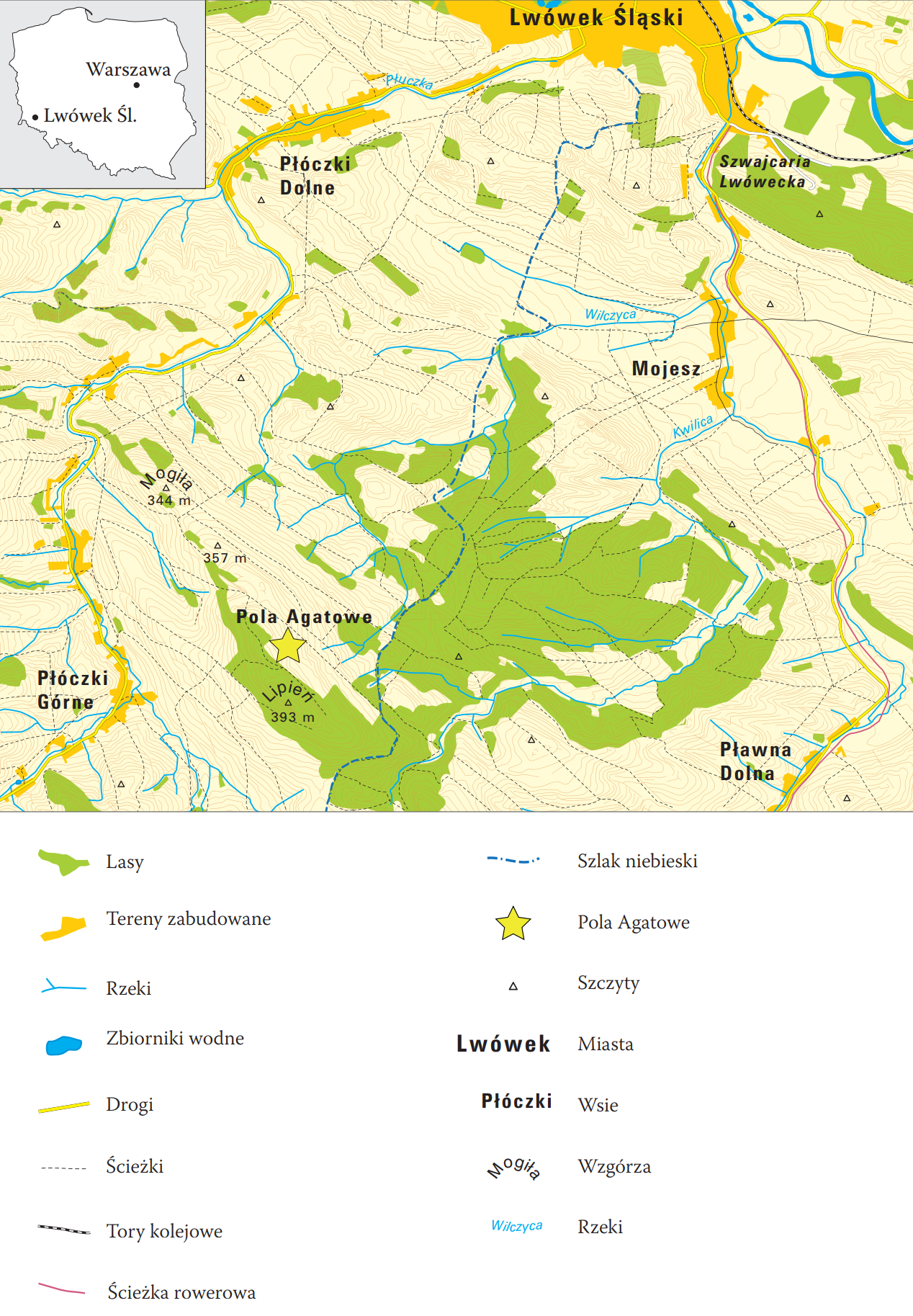 Mapa topograficzna obszaru pomiędzy Lwówkiem Śląskim a Płóczkami Górnymi